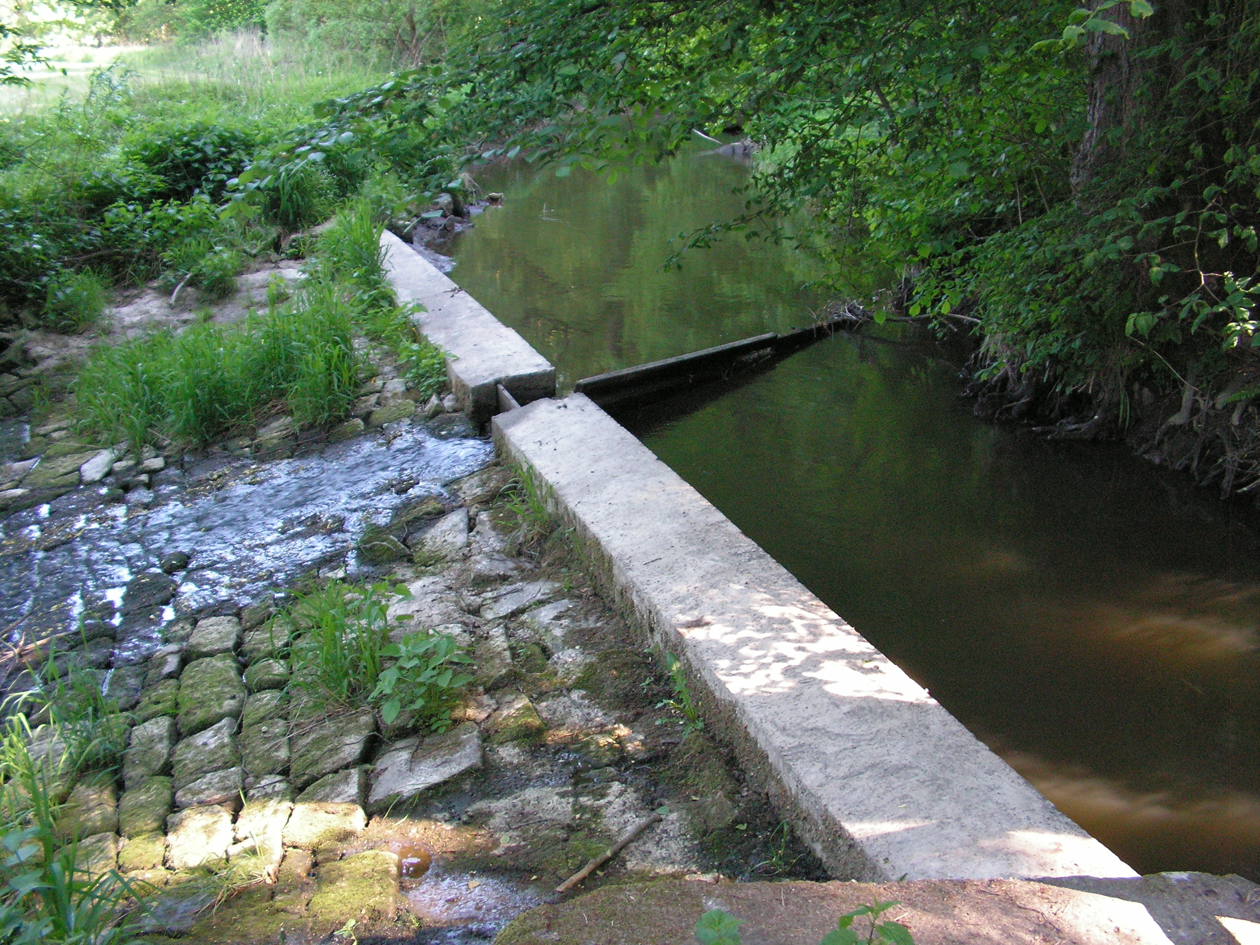 Jez s přepadem pro sanační průtok na Pstružném potoce (přítok Sázavy) zhruba na jeho 0,5 říčním kilometru.